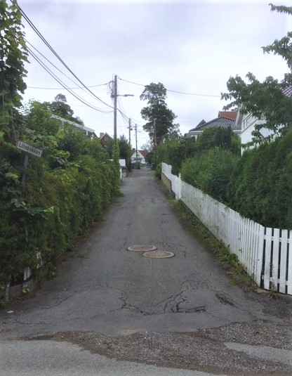 Lillebakken i Oslo august 2019